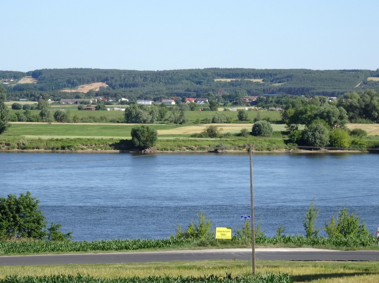 Rzeka Wisła w miejscowości Kozielec, powiat bydgoski, województwo kujawsko-pomorskie